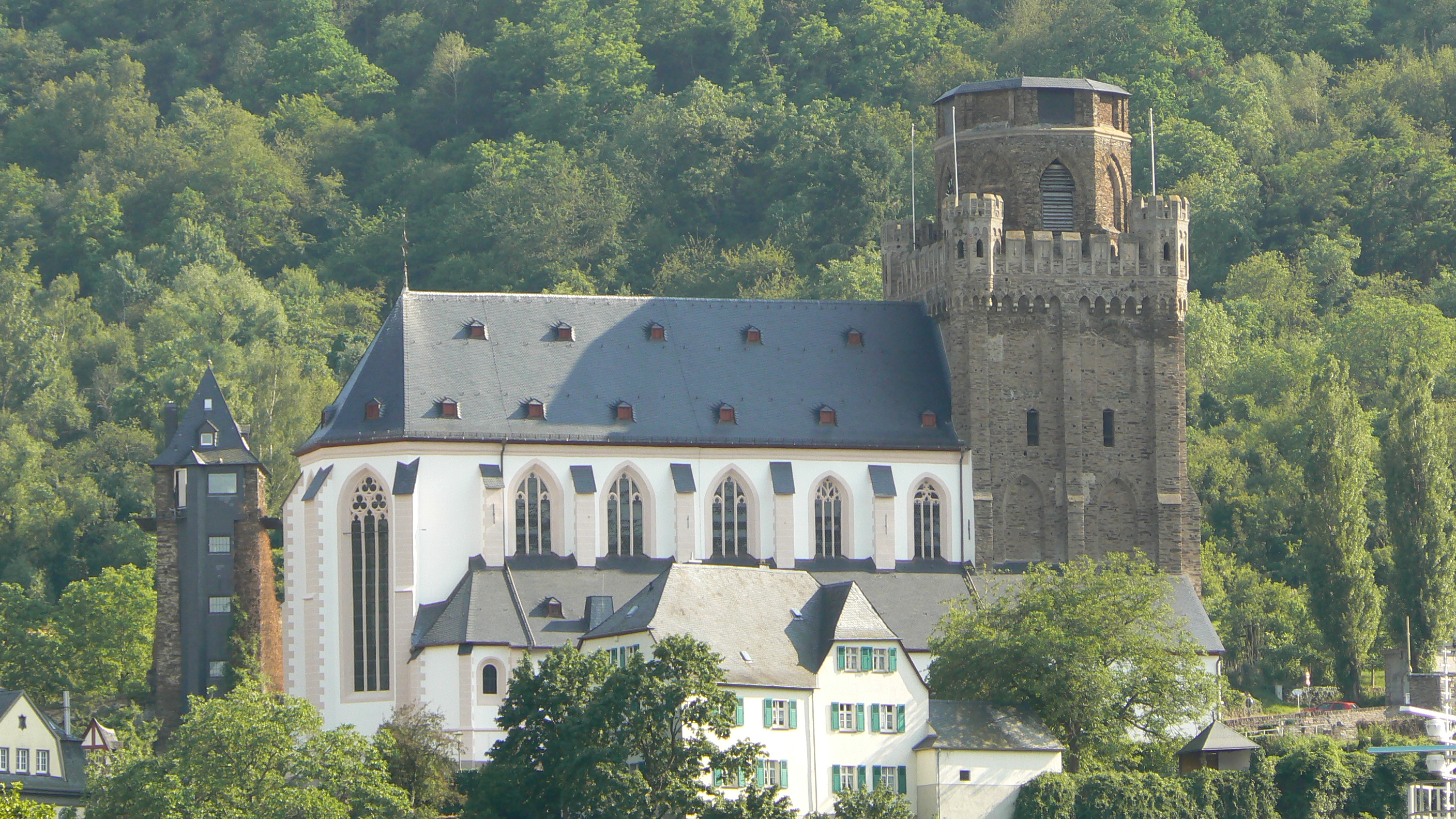 St. Martins-Kirche (Oberwesel)